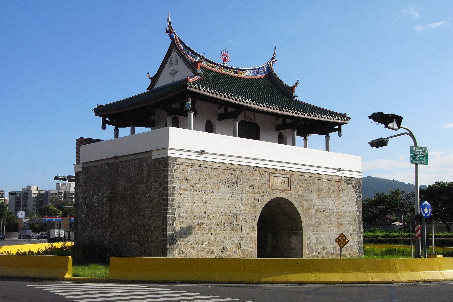 鳳山縣舊城南門圓環。